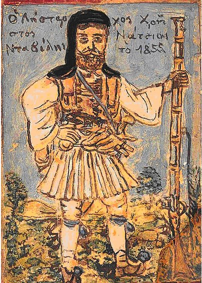 «Ο Λήσταρχος Χρήστος Νάτσιας Νταβέλης το 1855», λαδομπογιά πάνω σε χαρτόνι (23 x 31,5 εκ.), αχρονολόγητος κι ανυπόγραφος. Δημοτική Πινακοθήκη Ρόδου